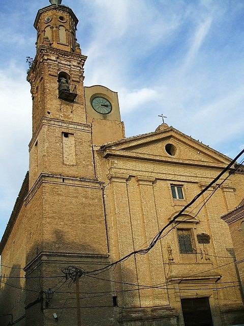 Iglesia parroquial de Santa María, Valtierra, Navarra, España